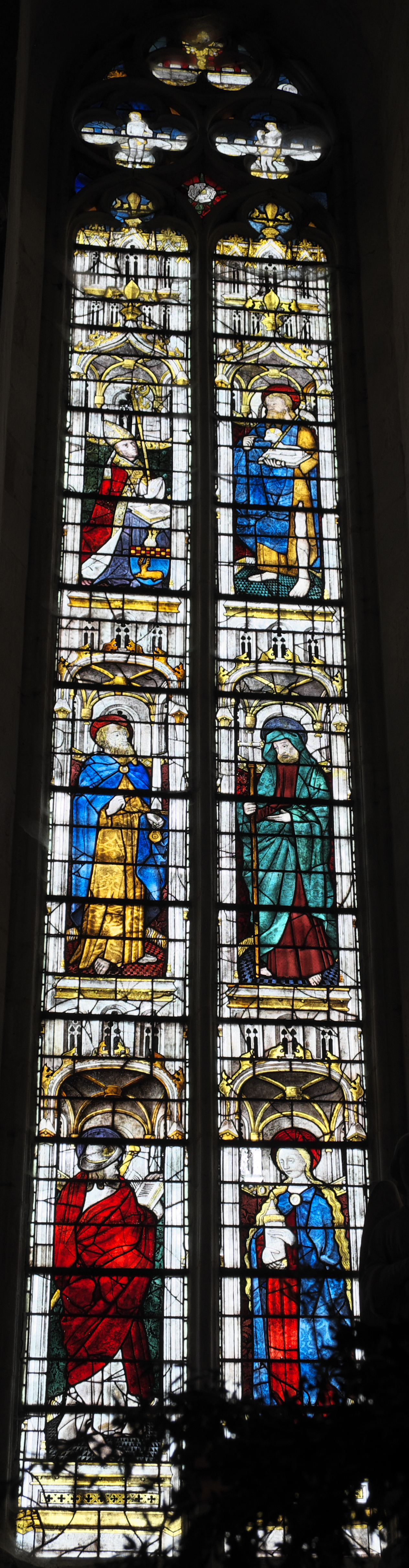 Stiftskirche Saint-Étienne in Eymoutiers im Département Haute-Vienne (Nouvelle-Aquitaine/Frankreich), Bleiglasfenster (Nr. 1) aus dem 15. Jahrhundert; Darstellung: Jakobus der Ältere (unten links), Maria Magdalena (unten rechts), Apostel Paulus (Mitte links), Apostel Philippus (Mitte rechts), Bischof Johannes I. Barton (oben links), und Johannes der Täufer (oben rechts)